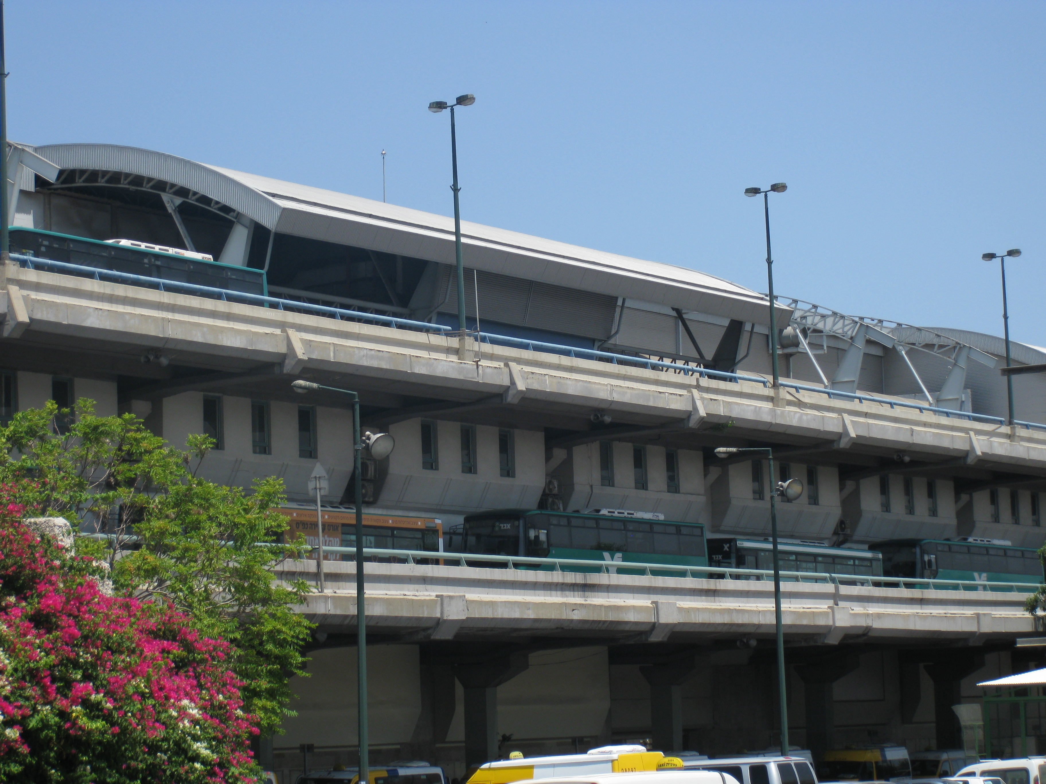 Tel Aviv New Central Bus Station התחנה המרכזית החדשה בתל אביב